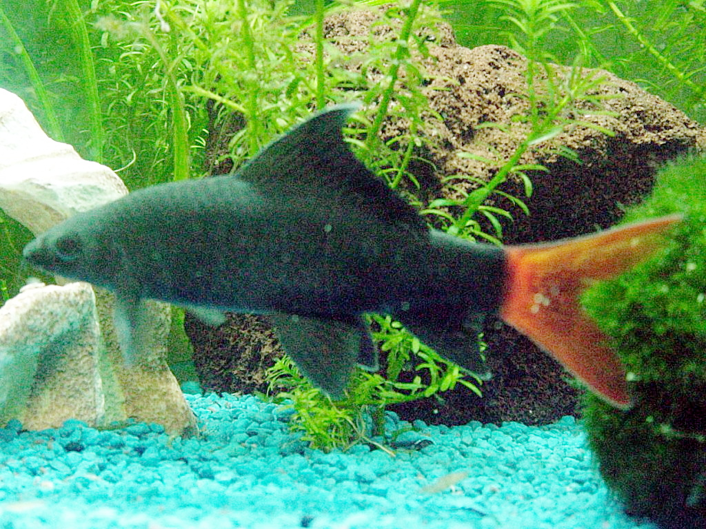 Feuerschwanz, Fransenlipper Fish, Aquarium own photography